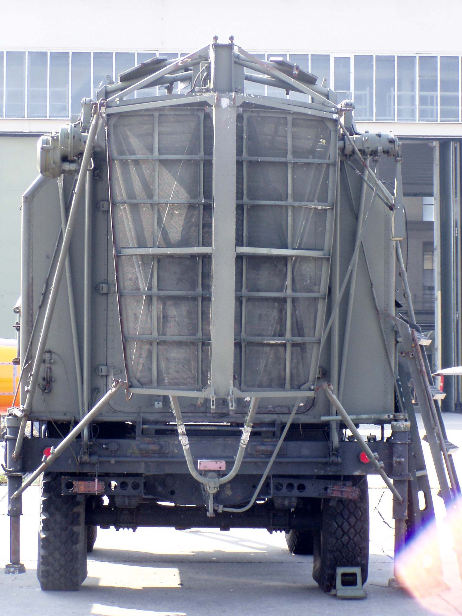 Sende- Empfangskabine des Höhensuchradars PRW-9 in Marschlage auf dem Vorfeld des Luftwaffenmuseums in Berlin-Gatow